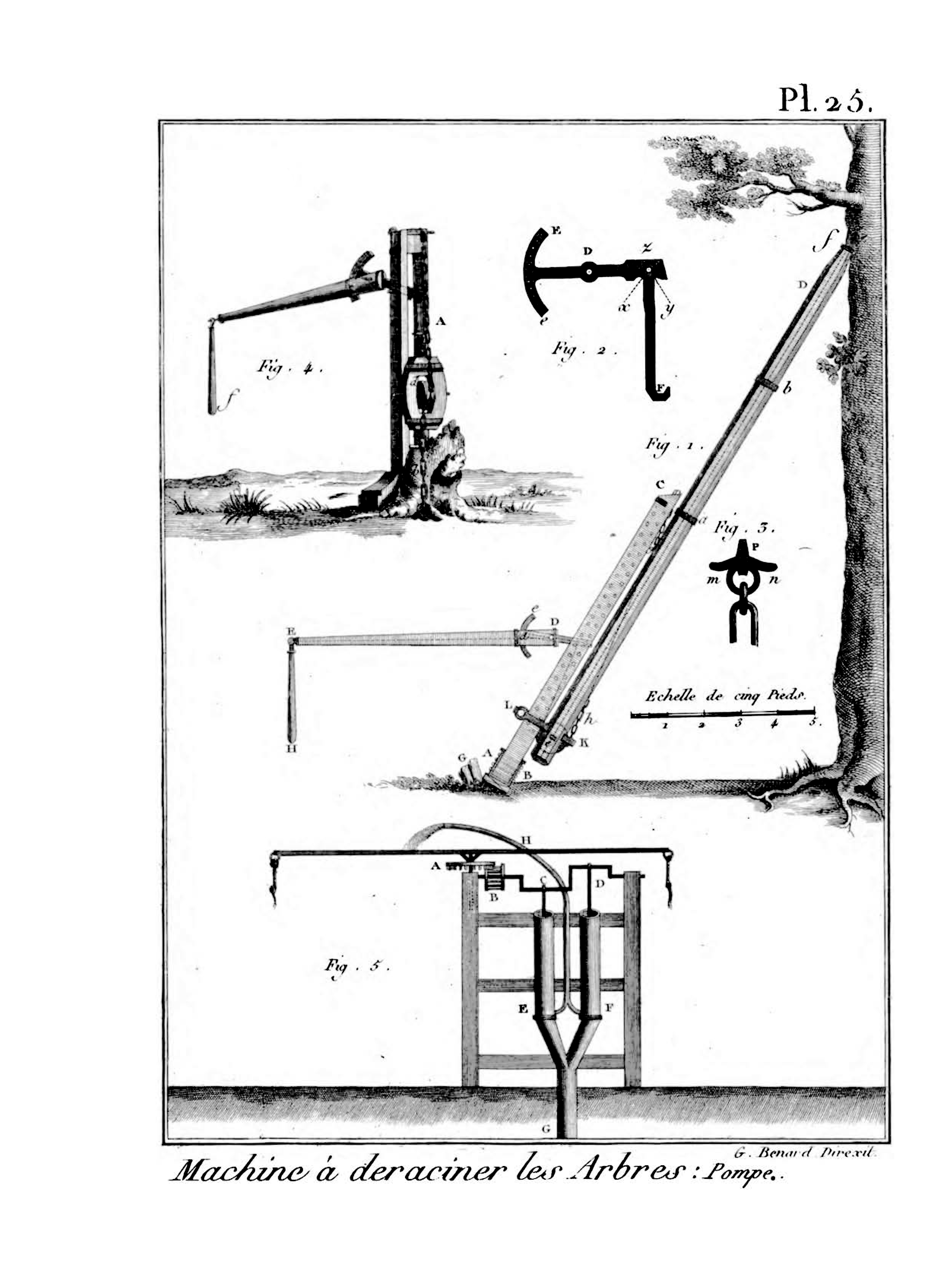 Art aratoire